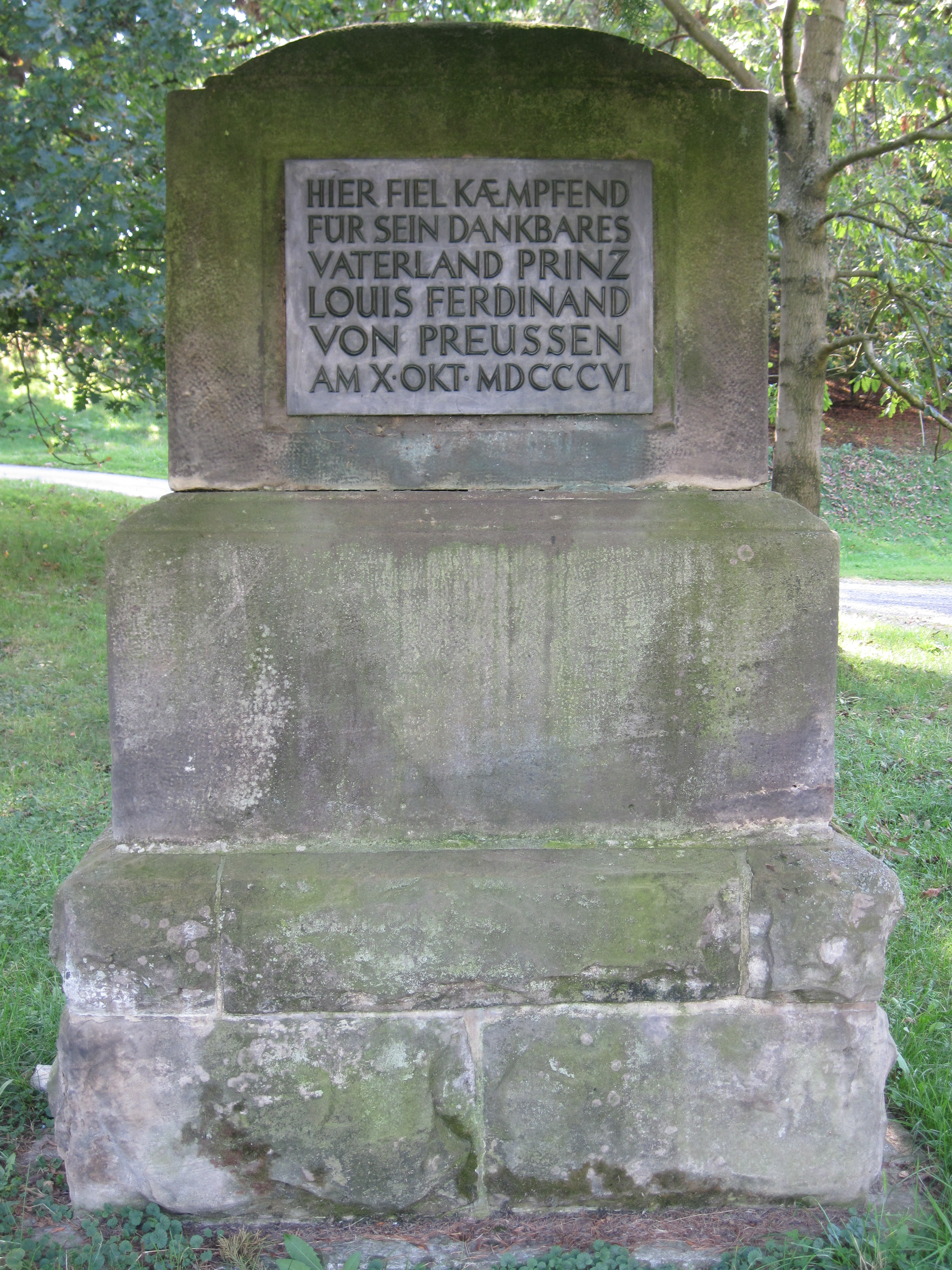 Gedenkstein für Prinz Louis Ferdinand von Preußen in Wöhlsdorf bei Saalfeld